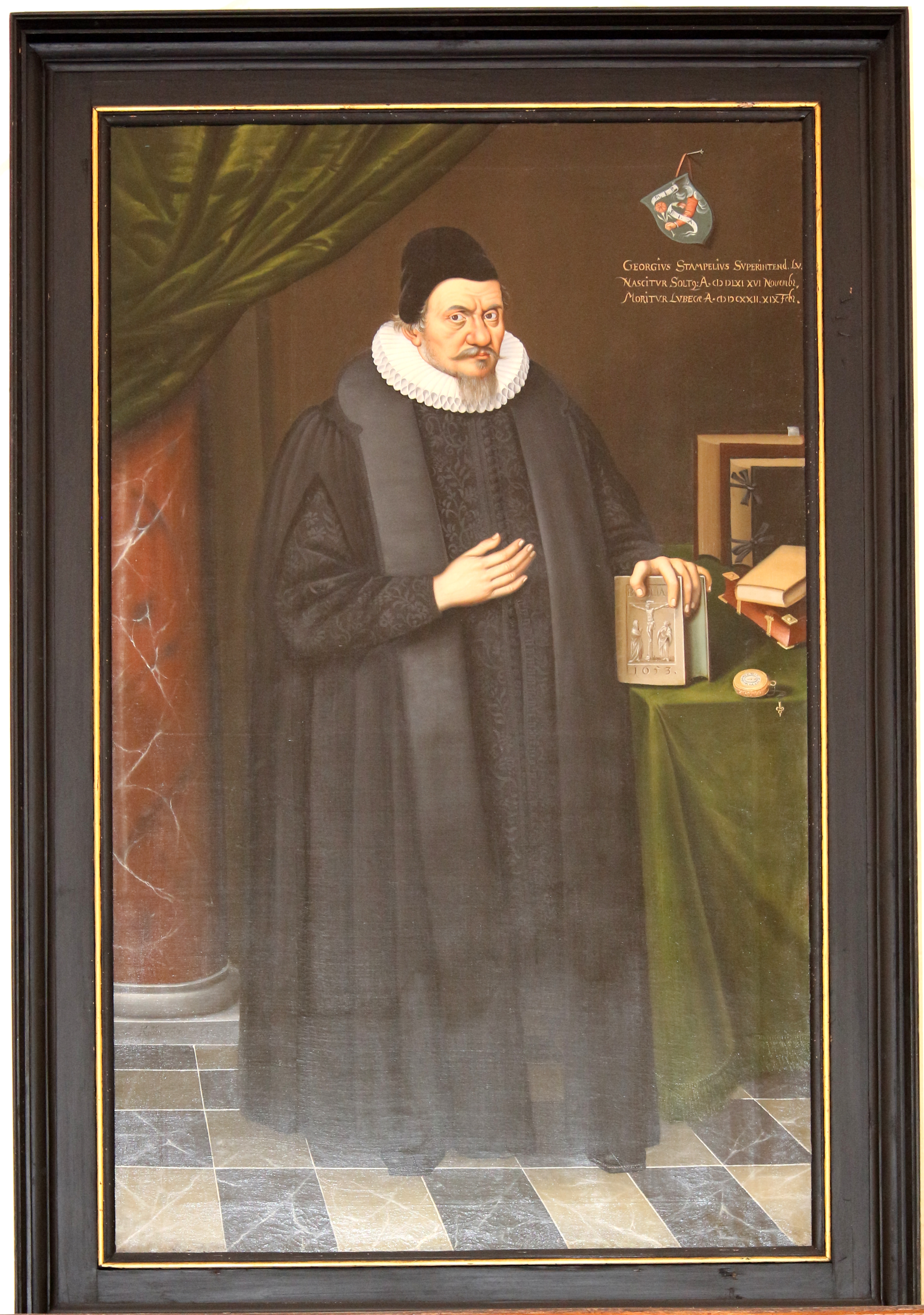 Georg Stampelius - Gemälde in der Stadtbücherei Lübeck